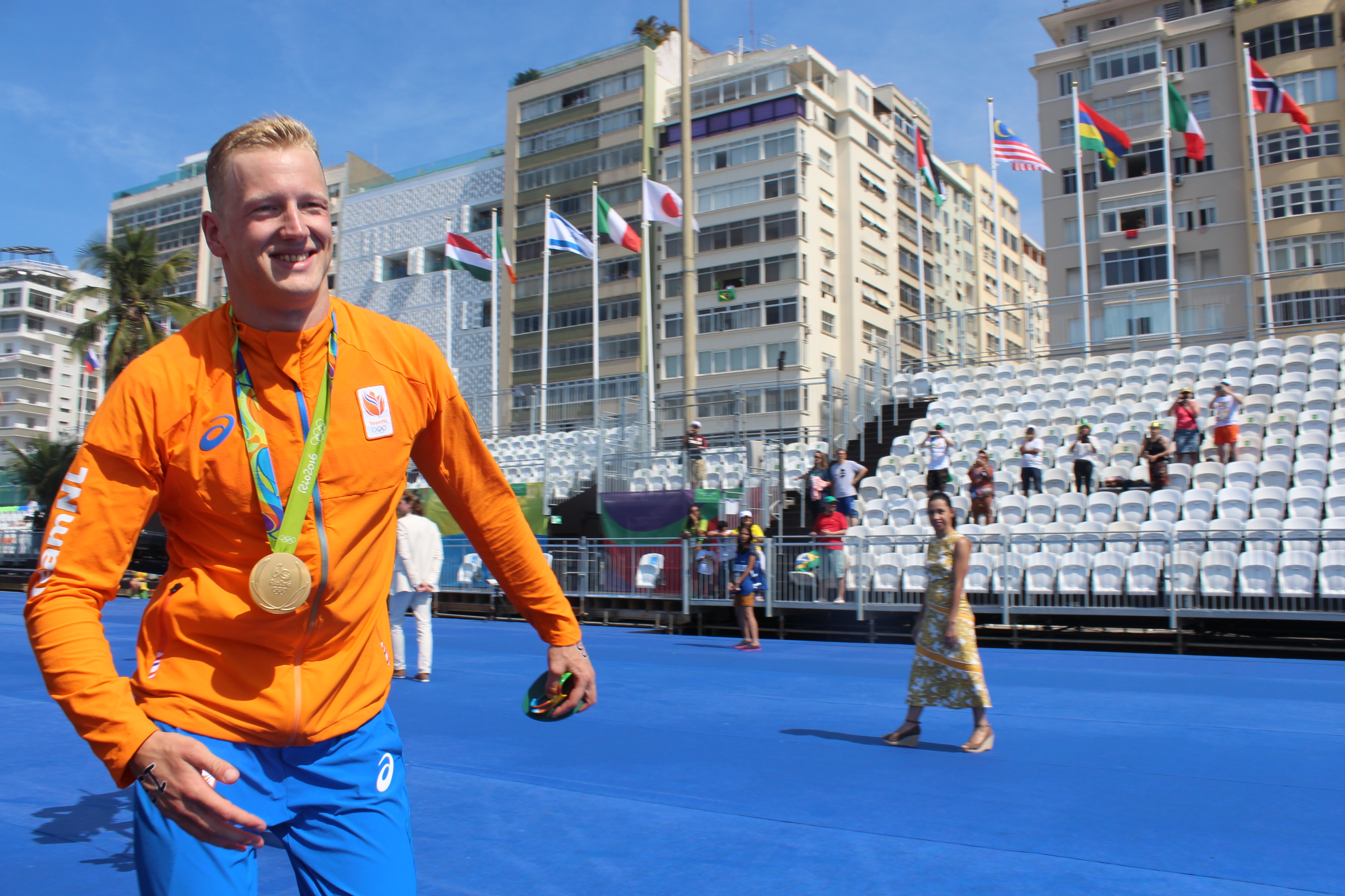 Campeão dos 10Km na Maratona Aquática cumprimentando o público após receber sua medalha de Ouro.